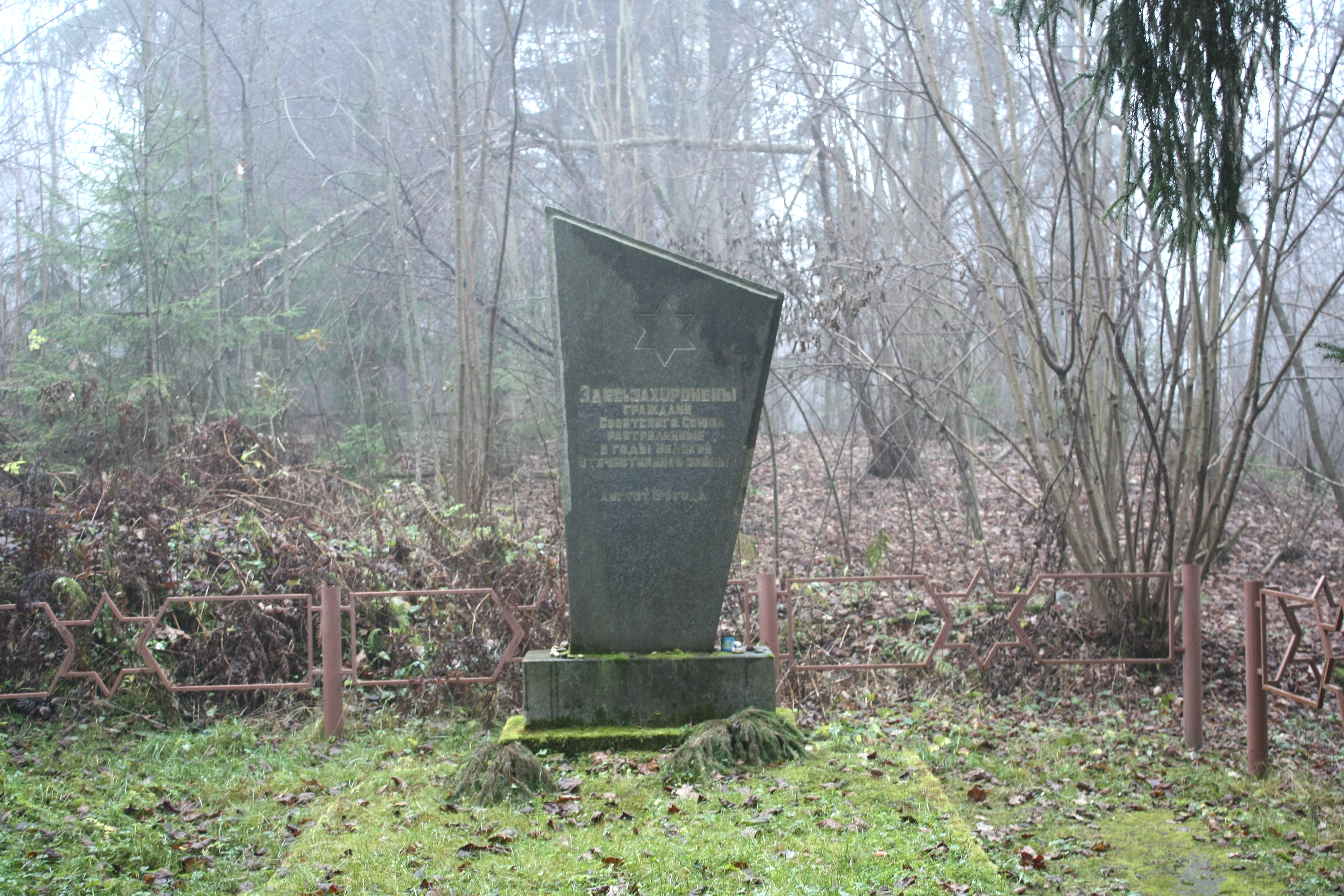 Памятник евреям - узникам гетто в Городке (Городокского района), убитым нацистами в Воробьевых Горах.